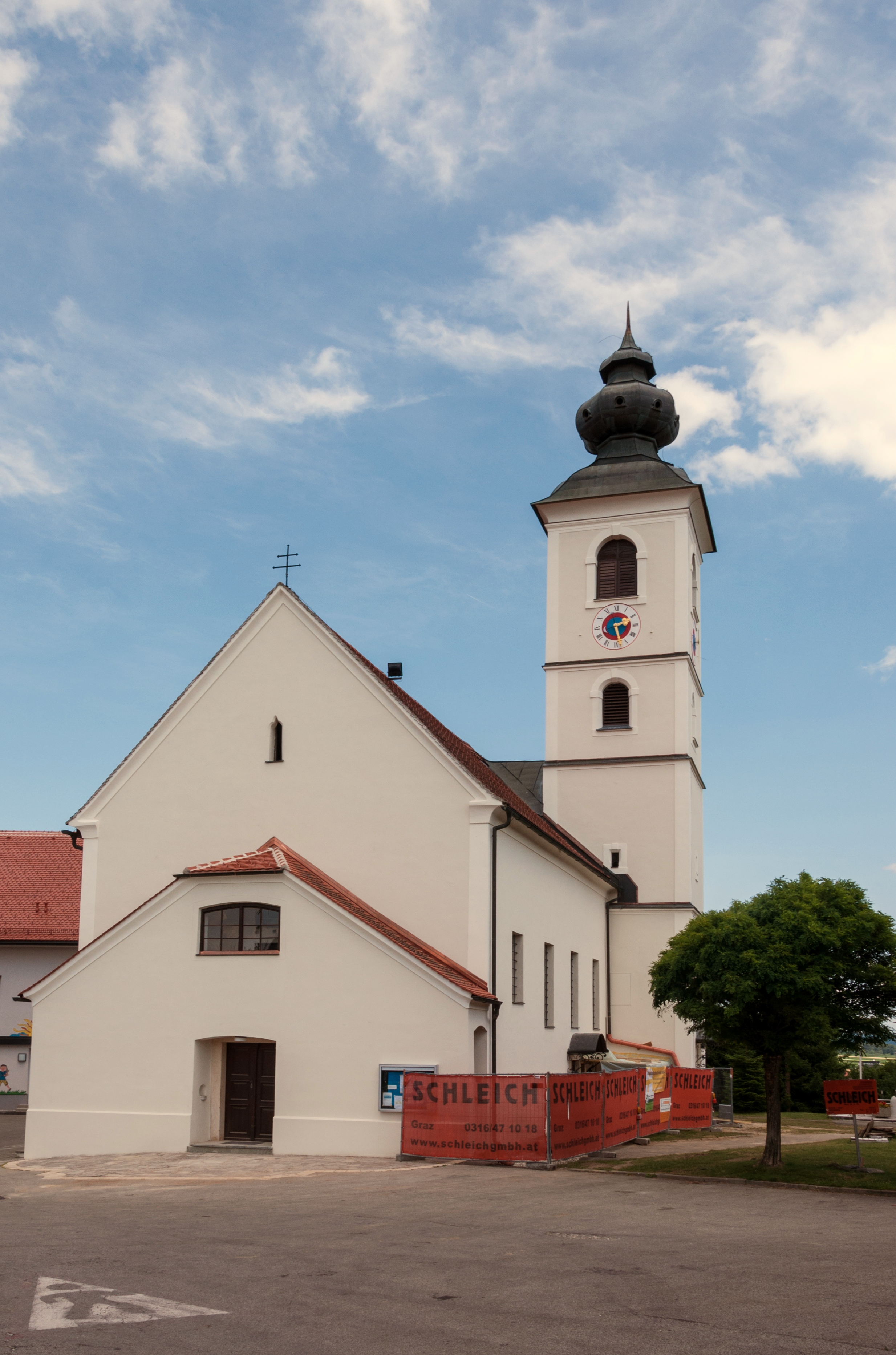 Kath. Pfarrkirche hl. Thomas und ehem. Friedhof mit Kruzifix (Umbau bzw. Renovierung im Jahre 2013).